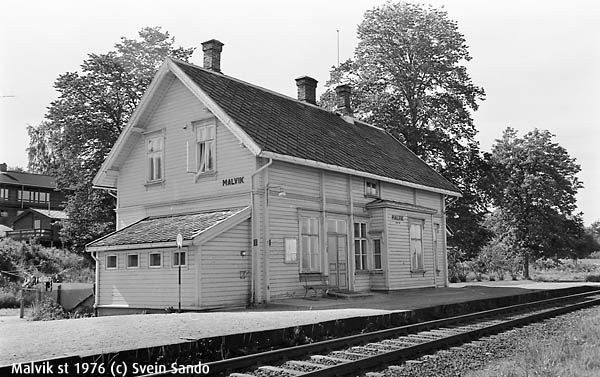 Malvik stasjonsbygning i 1976